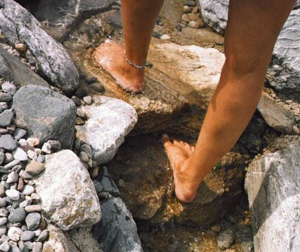 Barfußlaufen in der Natur.